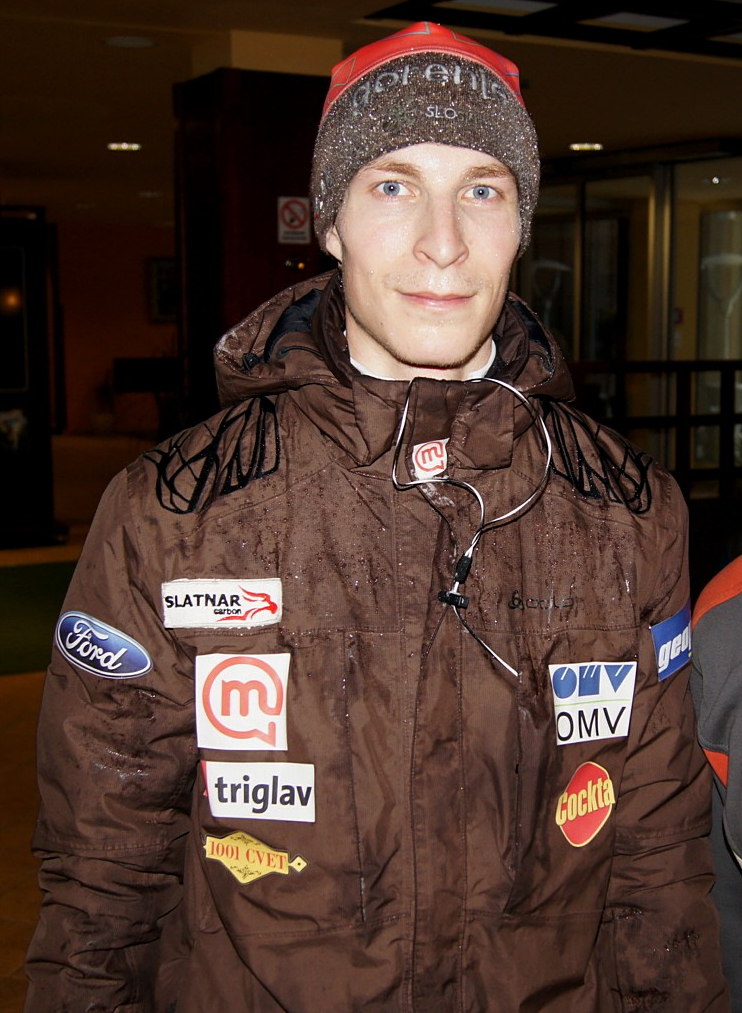 Tepeš Jurij